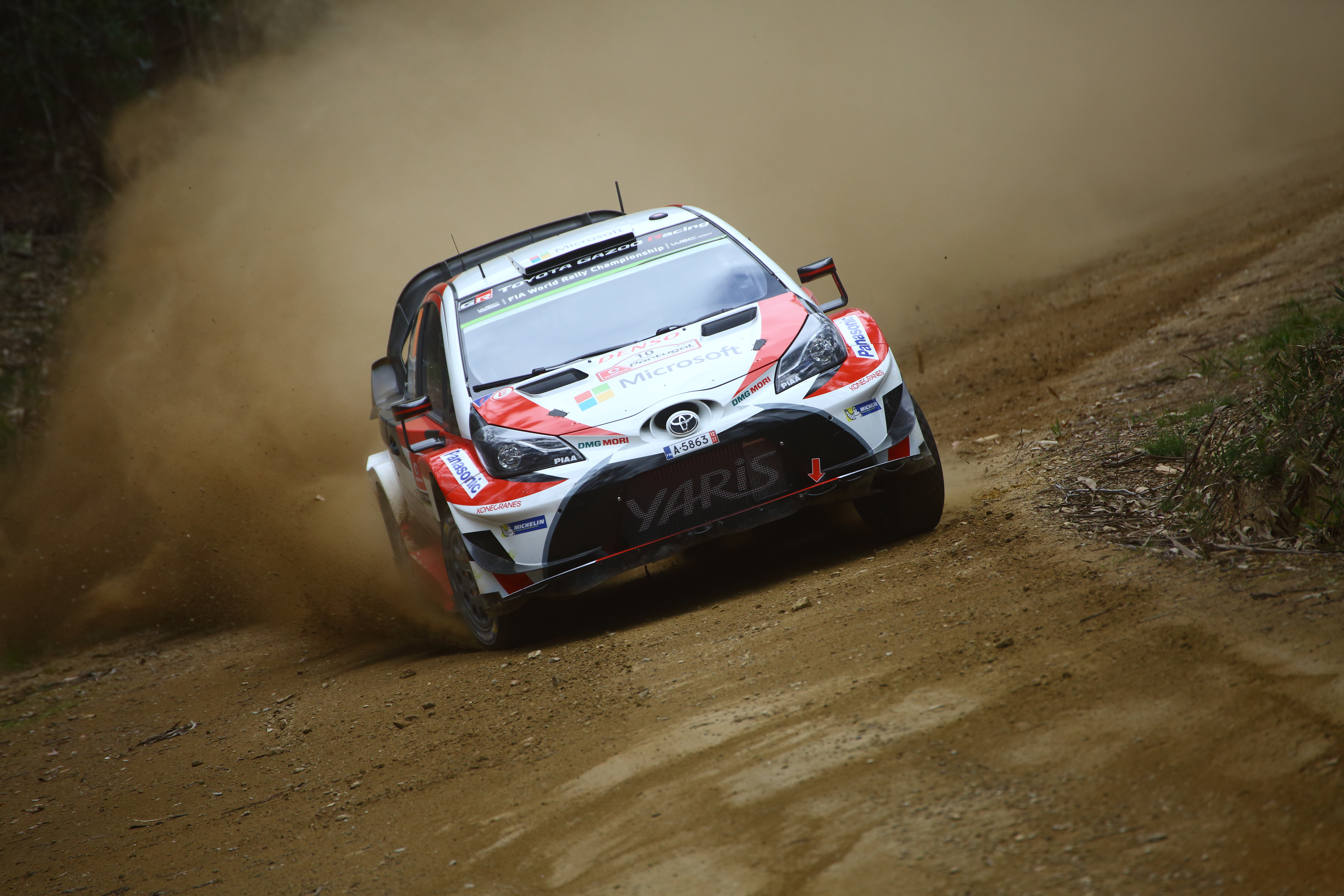 2017 Rally Portugal